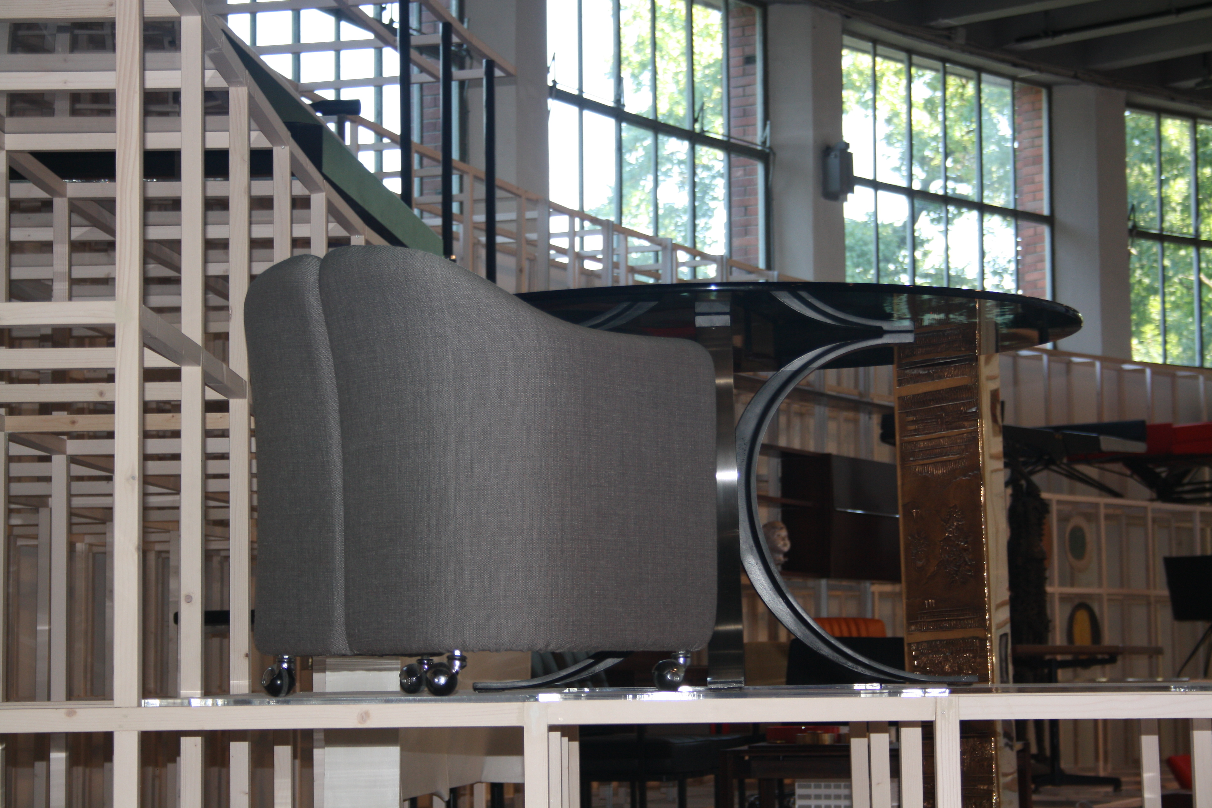 Mostra Triennale Mag/Sett.2018 - P142 design Eugenio Gerli e tavolo T69 design Eugenio Gerli ed Osvaldo Borsani